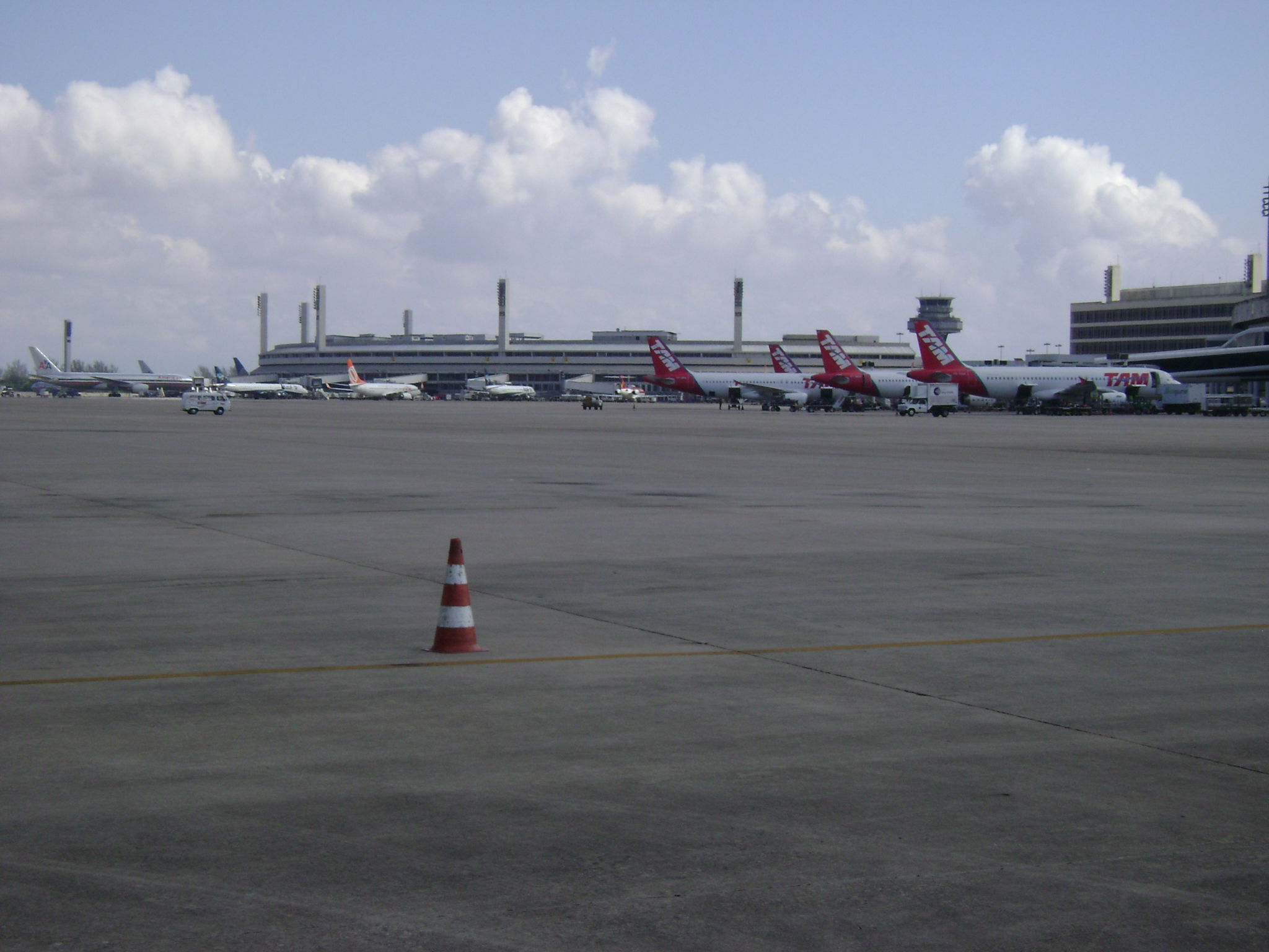 Imagem do Aeroporto Internacional do Rio de Janeiro Tom Jobim/Galeão, no Rio de Janeiro, Brasil.